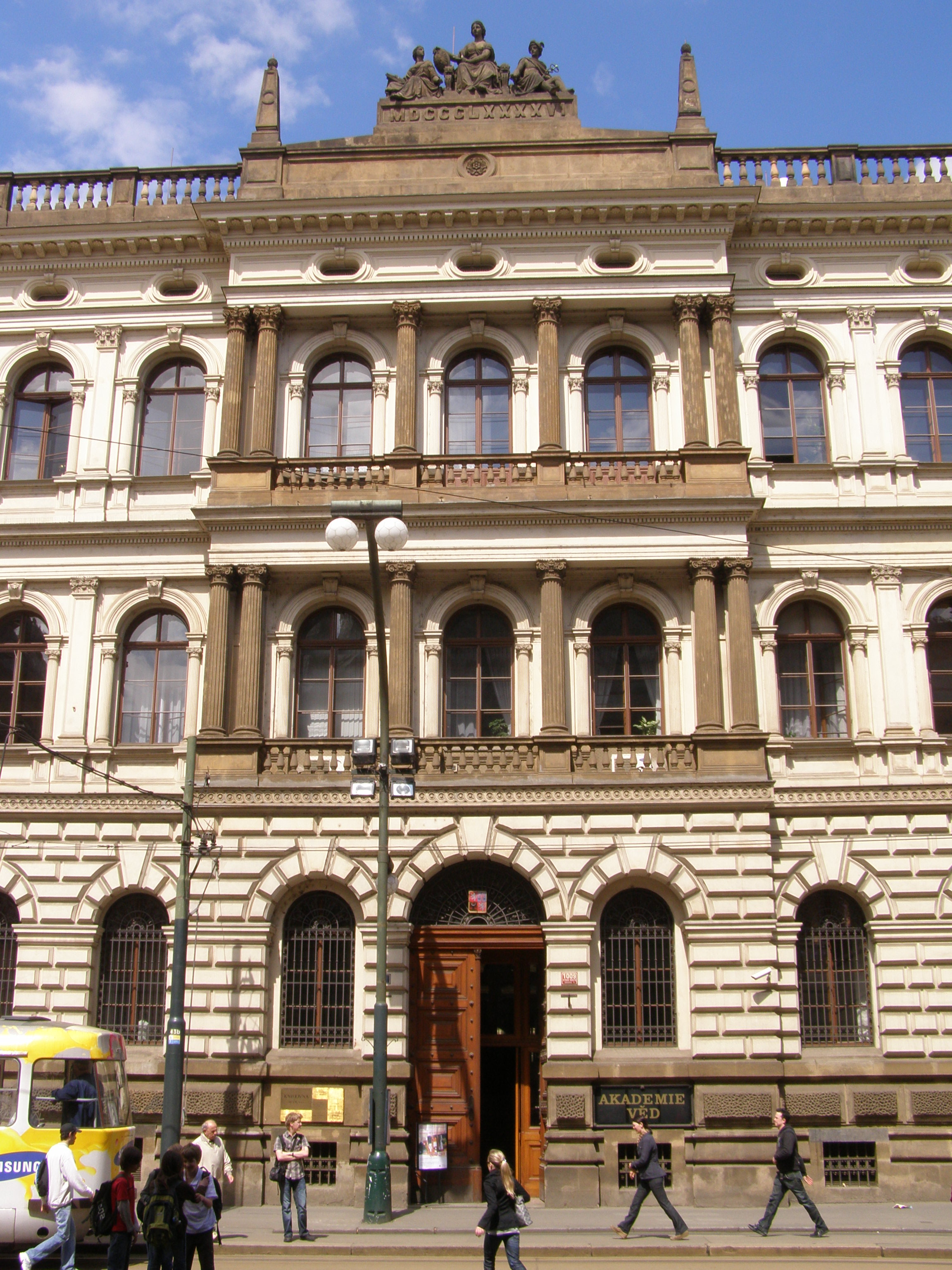 Praha, Staré Město, Národní třída, budova Akademie věd České republiky